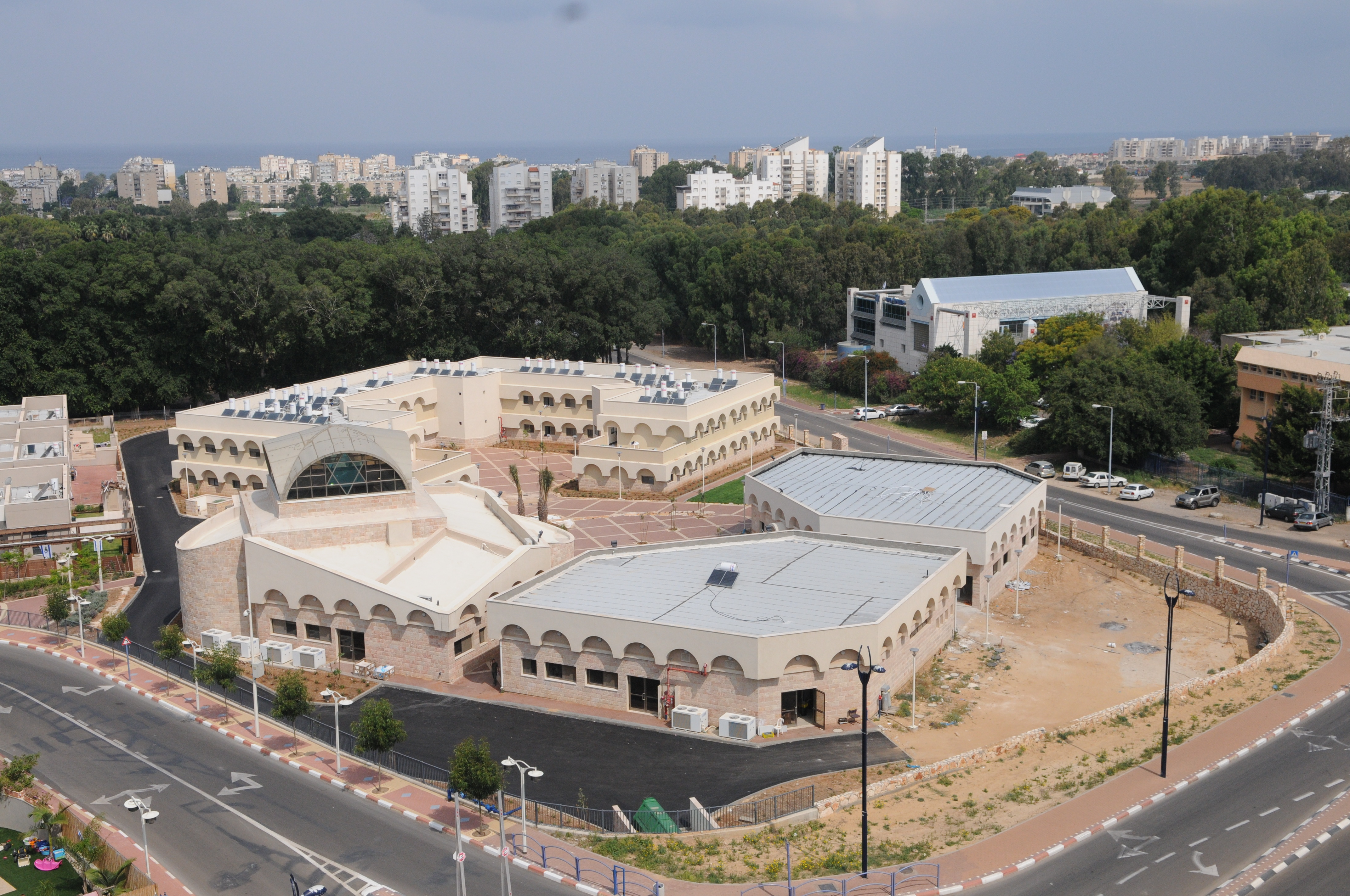 מבנה הישיבה